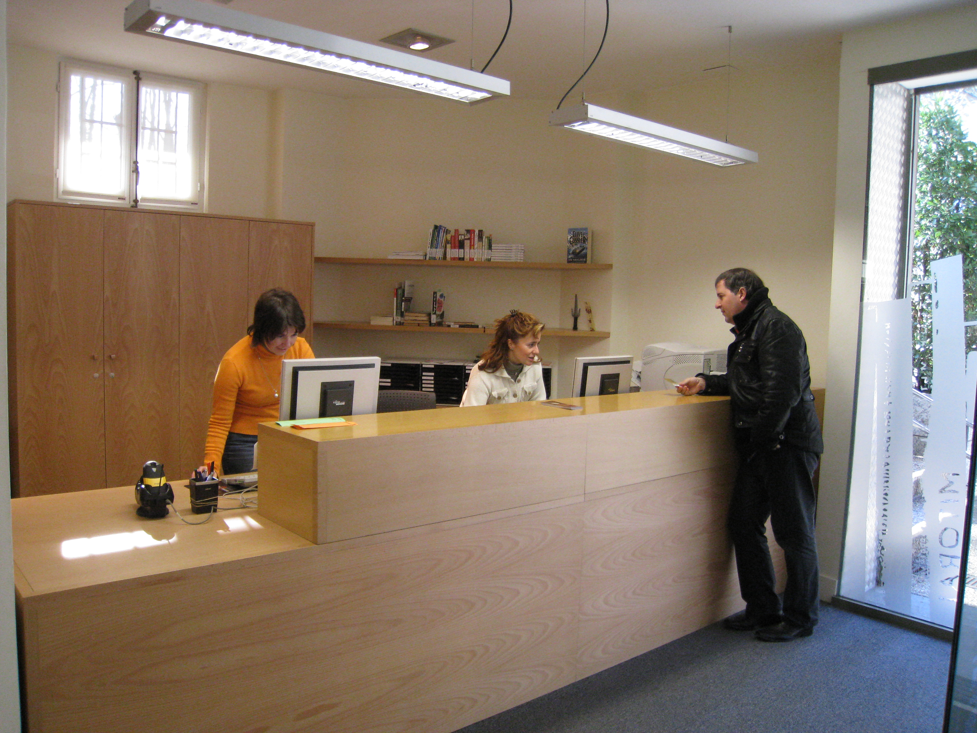 Servicio de Préstamo de adultos